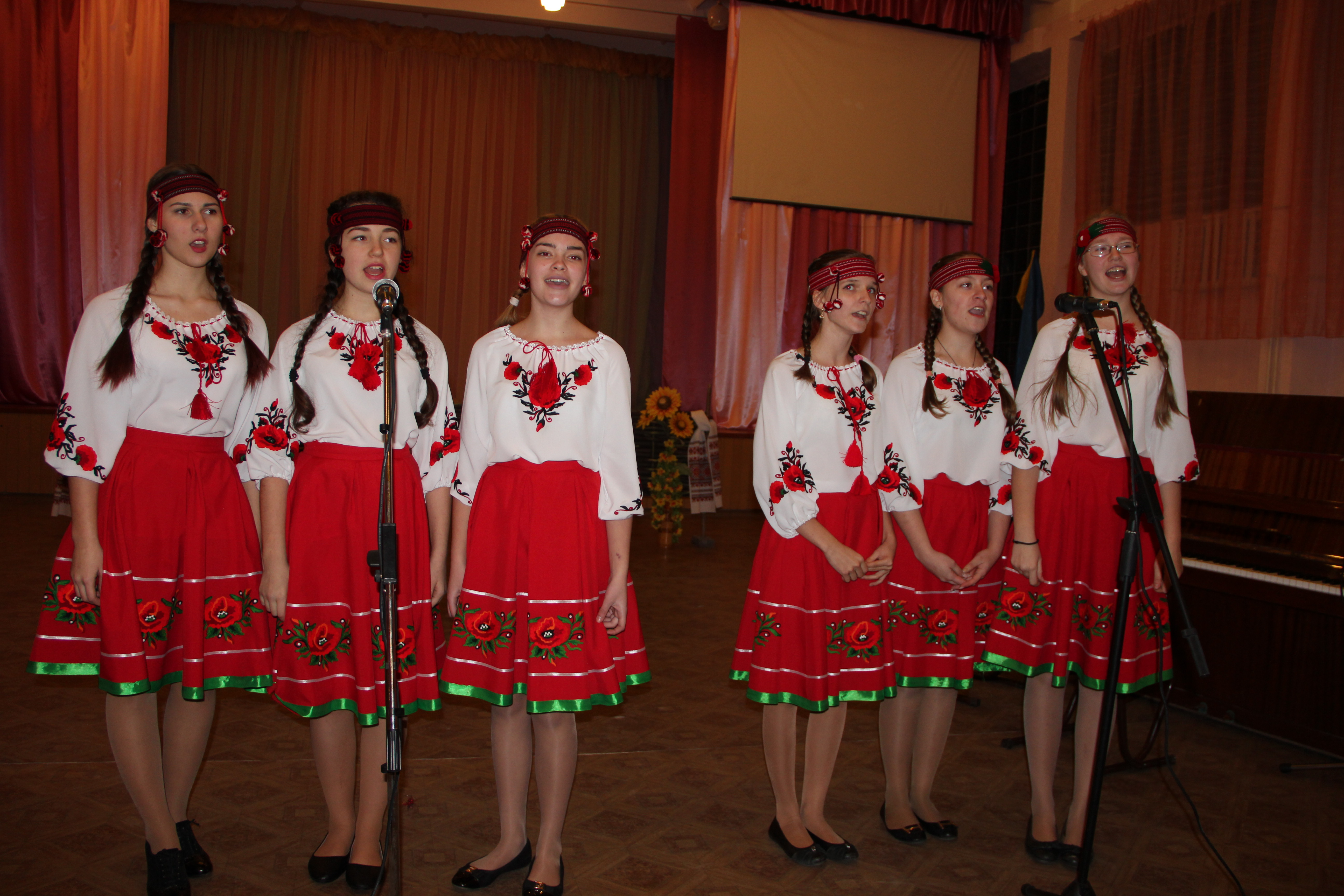 Вокальный ансамбль учащихся старших классов